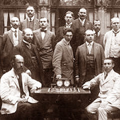 Stepan Levitskij (1876-1924), scacchista russo e sovietico (il primo a sinistra)